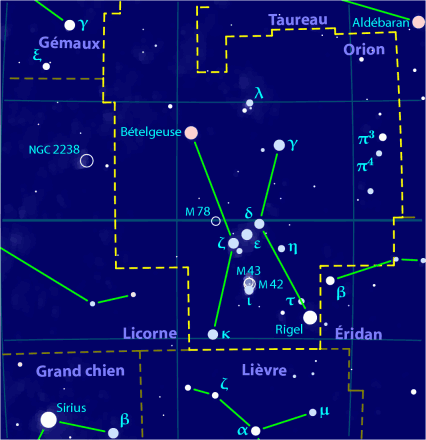 Carte pour la constellation Orion Produite à l'aide du logiciel PP3